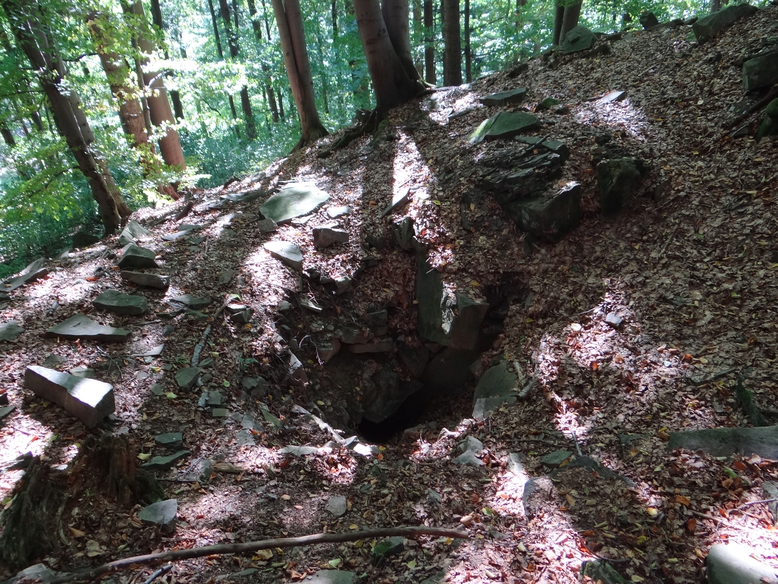 Jaskinia w Czarnych Działach